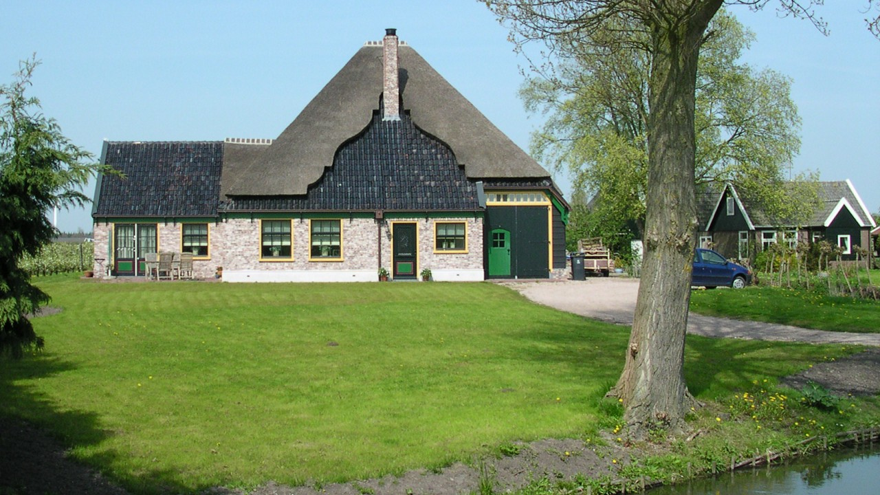 Een boerderij-huis in De Weed A farmhouse in De Weed